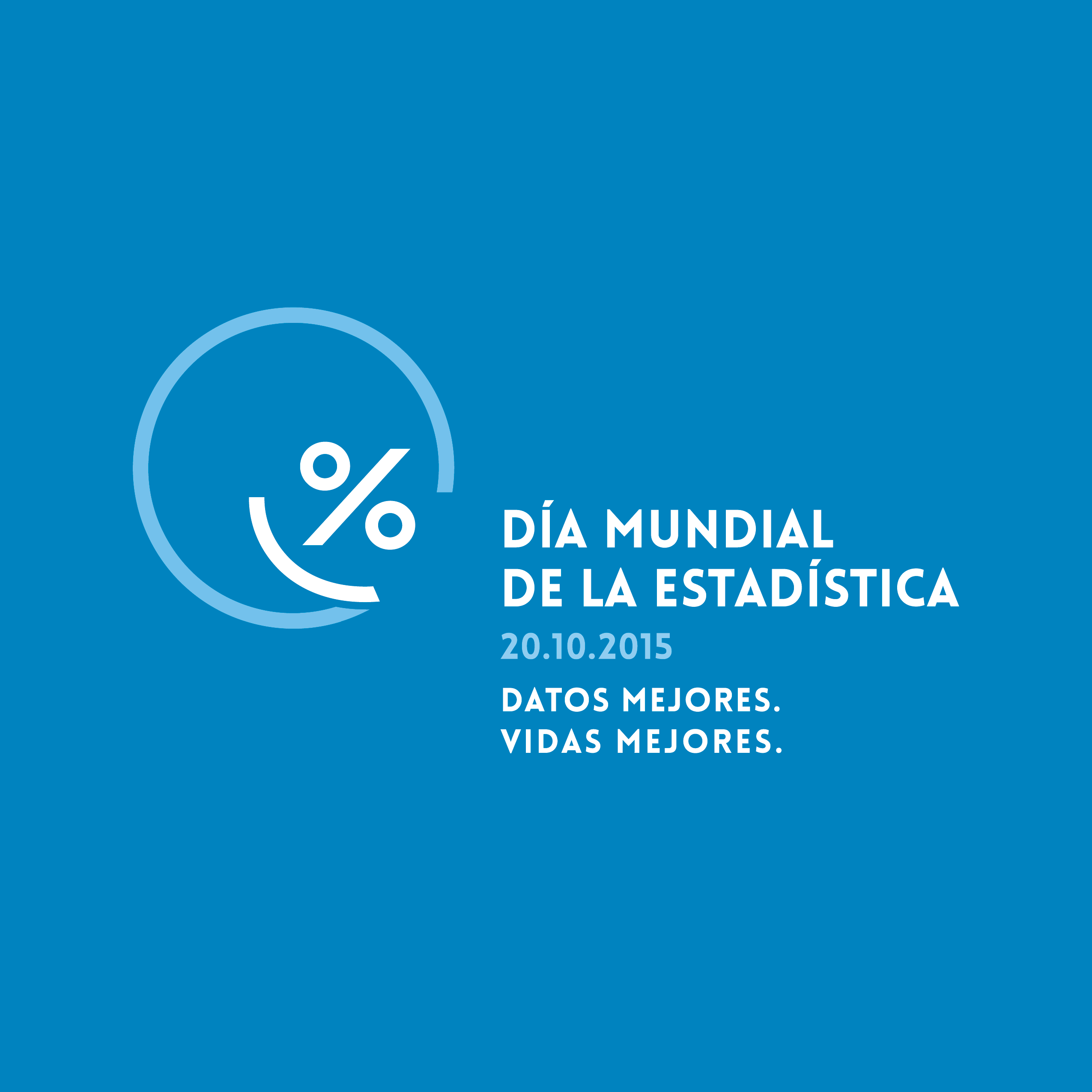 Día Munduial de la Estadística 2015, "Datos mejores. Vida mejores” 20 de octubre de 2015